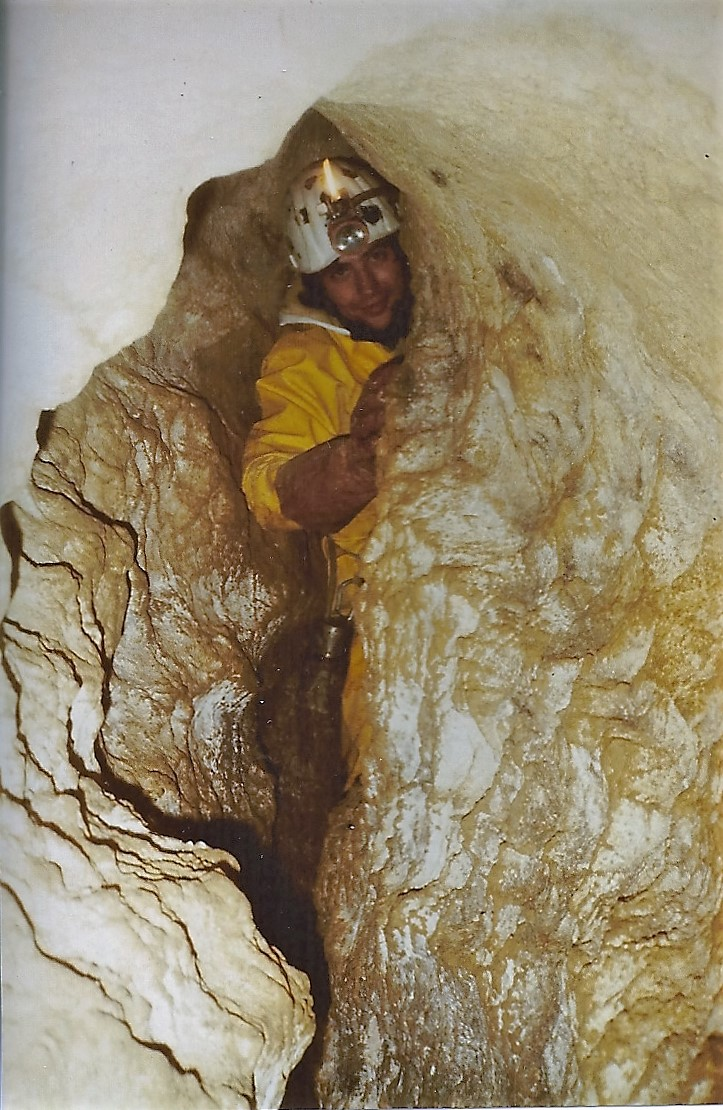 Daniel Bruyére dans un méandre étroit dans le scialet des brumes matinales.